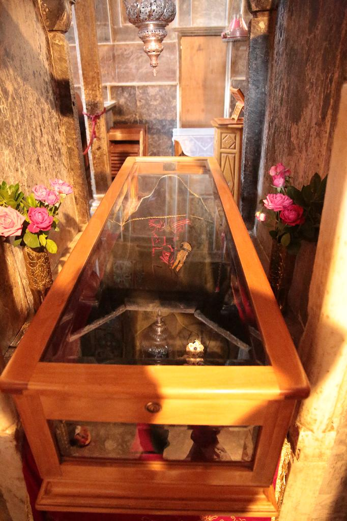 Μονή Οσίου Λουκά